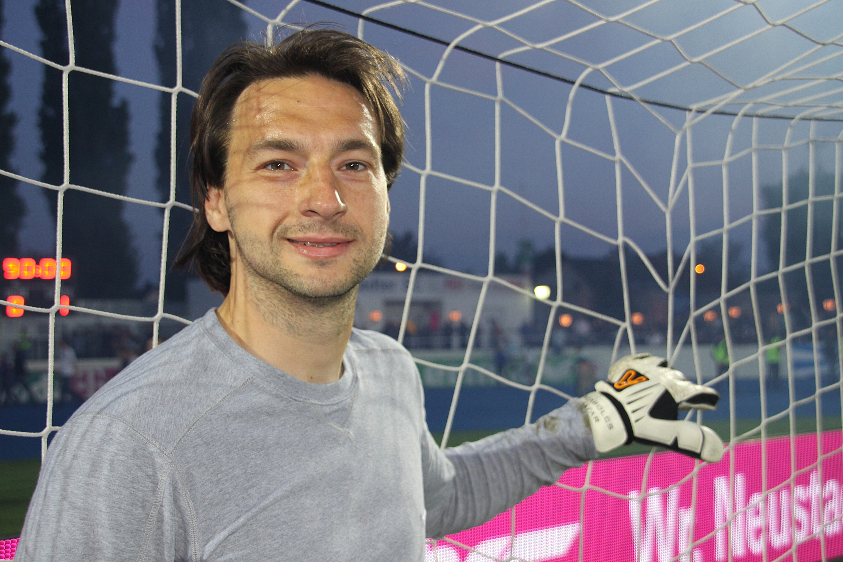 Szabolcs Safar - FK Austria Wien (Bild 2)